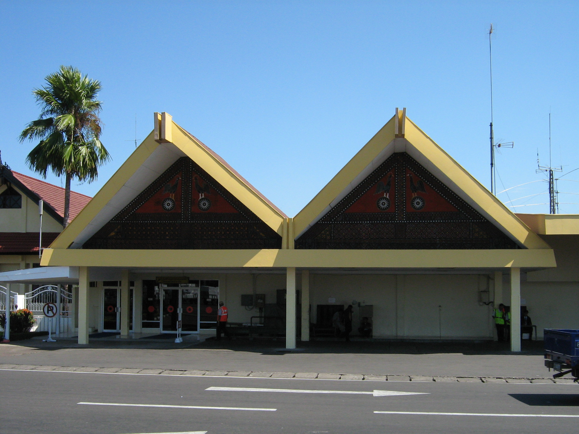 torajaähnliches Dach am Flughafen von Makassar